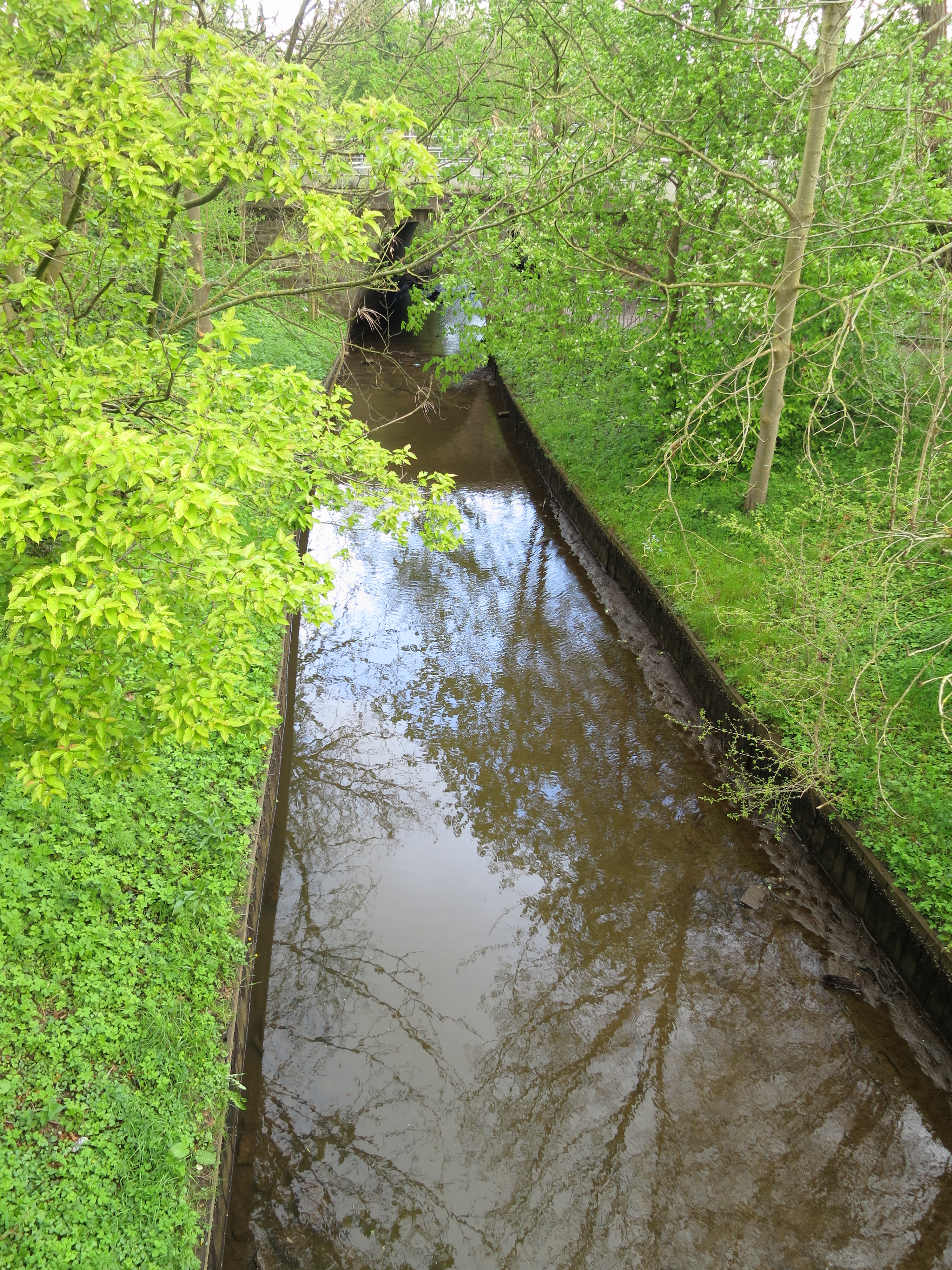 Die Blumenthaler Aue in Bremen-Blumenthal zwischen Bahnschienen und Busbahnhof; Blickrichtung entgegen Fließrichtung